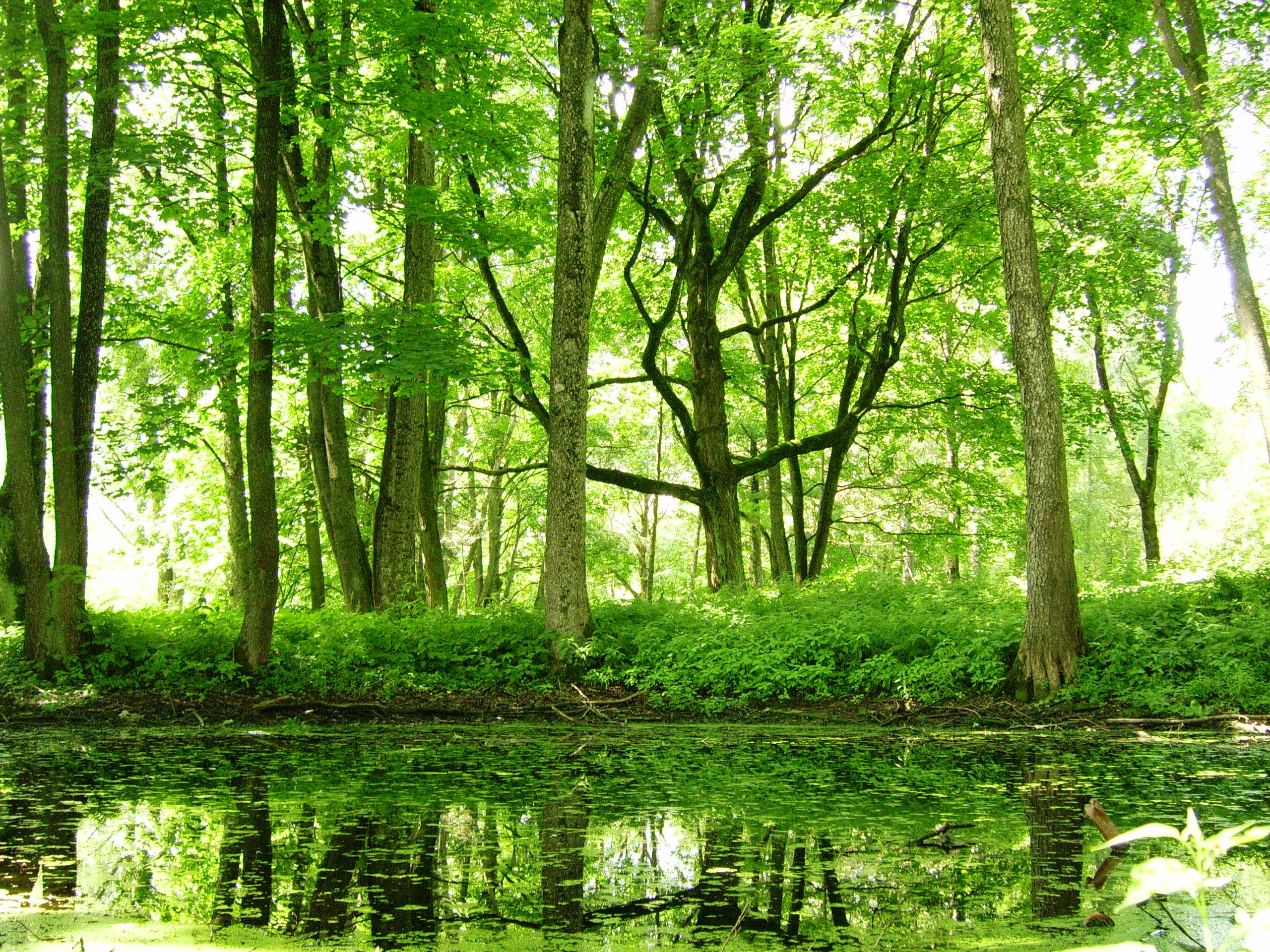 Trepų dvaro parkas